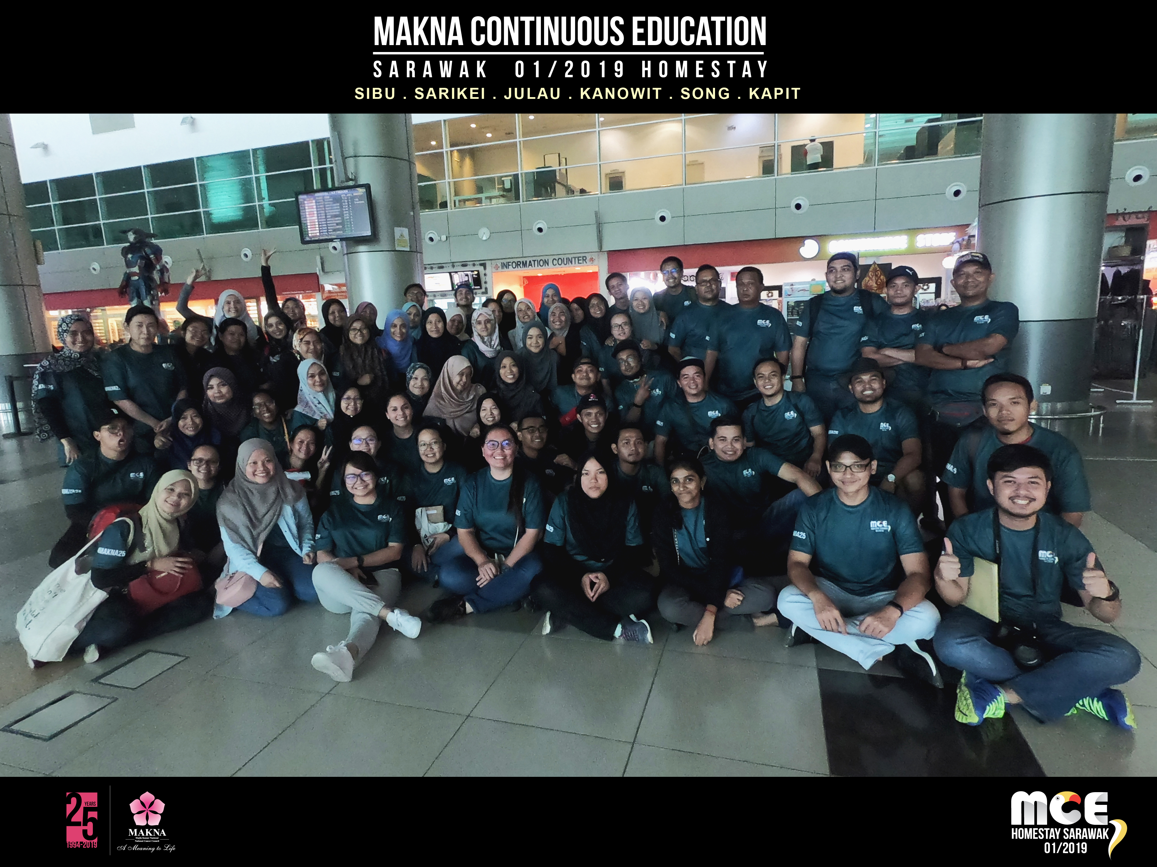 MAKNA Continuous Education Sarawak 01/2019 Homestay.